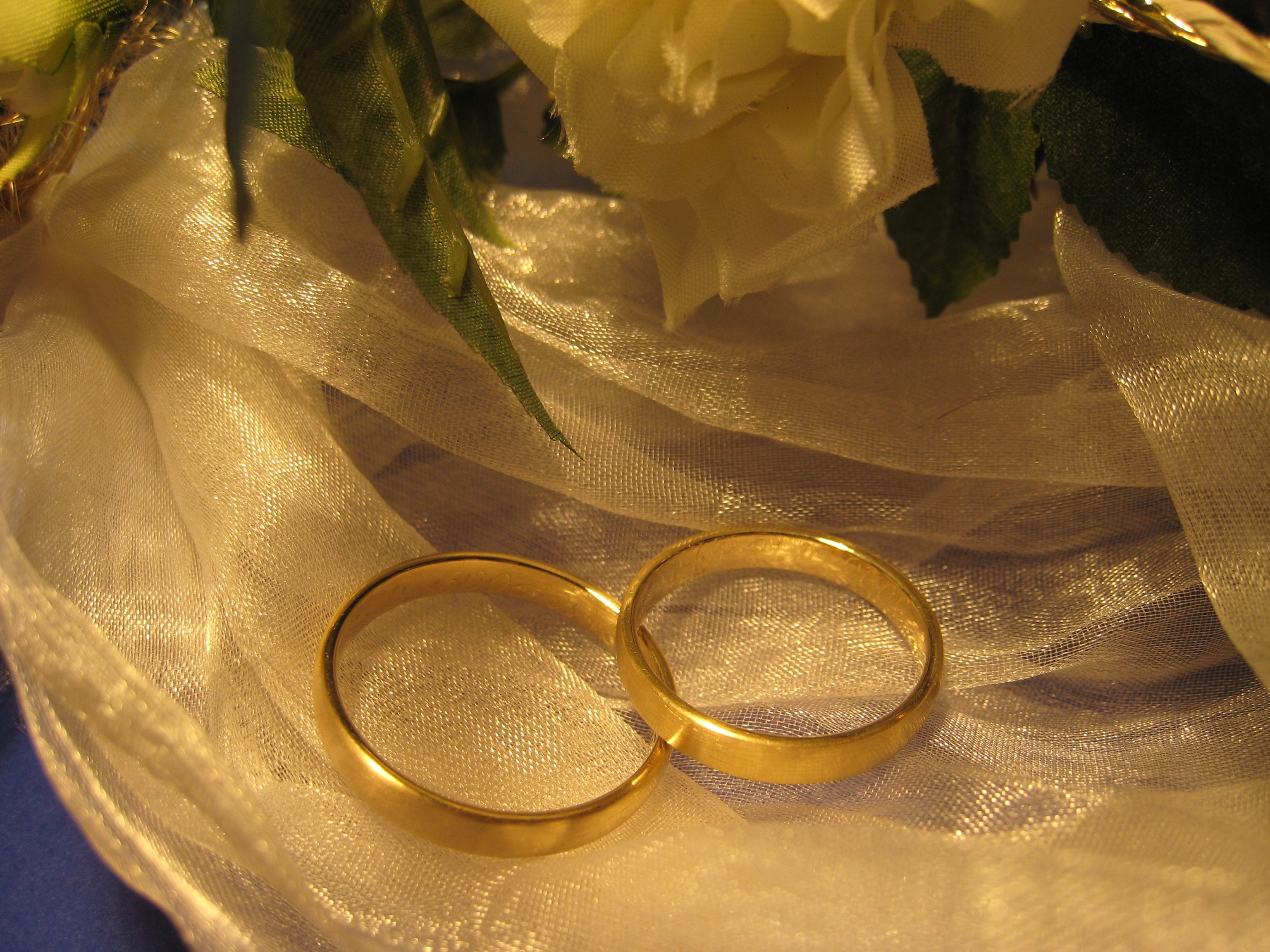 ilustracje lub zdjęcia: róży; logo WOŚP; obrączek; amora English | Polski | +/−